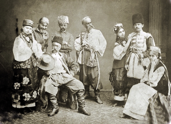 Перші виконавці опери Миколи Лисенка «Різдвяна ніч». Стоять: Солоха (Липська), Дяк (Матвіїв), Чуб (Новицький), Пацюк (Станіслав Габель), Оксана (Лисенко), Вакула (О. Русов). Сидять: Голова (Богданів), Одарка (Булах). Фотографія зроблена у 1873 році у Києві. Джерело опису